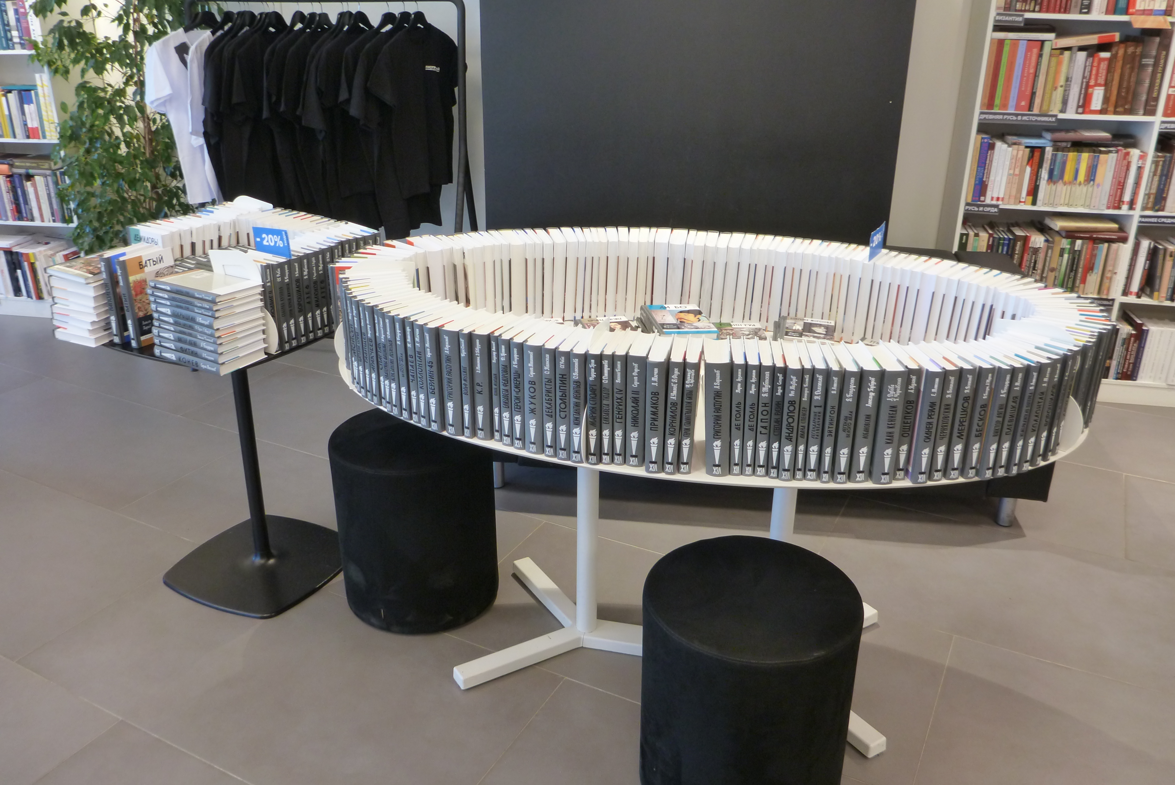 Книги серии Жизнь замечательных людей в Пиотровском 26 мая 2019 года